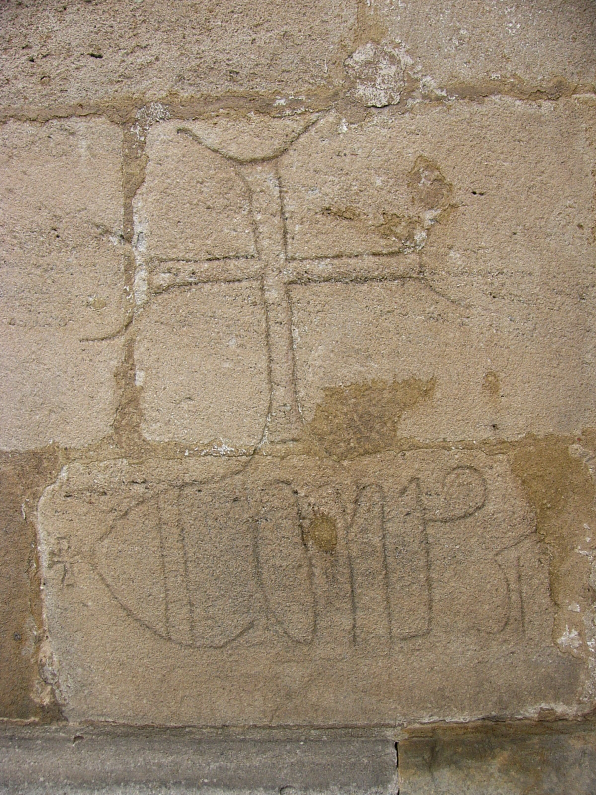 Hinweis auf die Grabstätte des letzten Schlüsselberger Grafen an der Außenmauer der Kirche